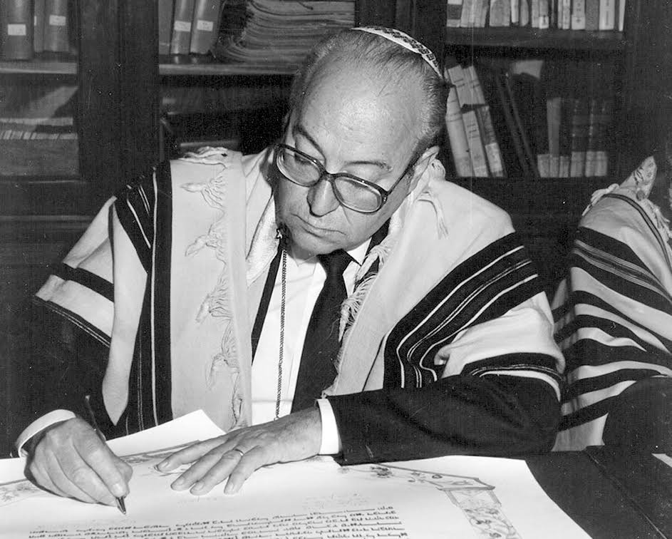 1990 - הרב סיארה חותם על כתובה בתור "מסדר" של אחד מאין-ספור חתונות שסידר.